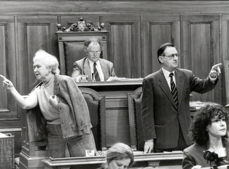 Im Schweizer Ständerat (kleine Parlamentskammer) wird das Resultat einer Abstimmung ermittelt. Von links: Ständerätin Esther Bührer, Ständeratspräsident Arthur Hänsenberger und Ständerat Riccardo Jagmetti